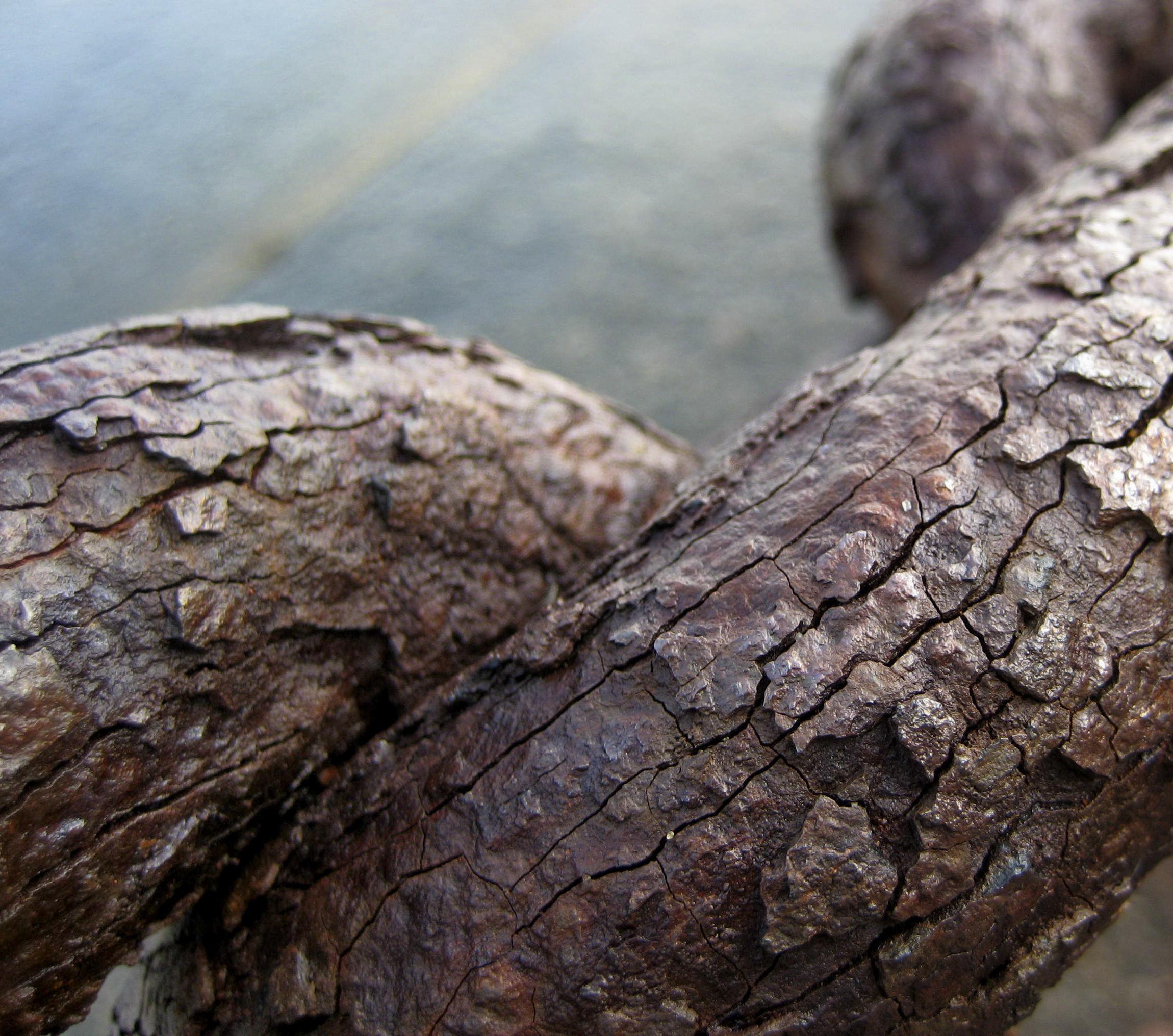 Raschteg Ketten